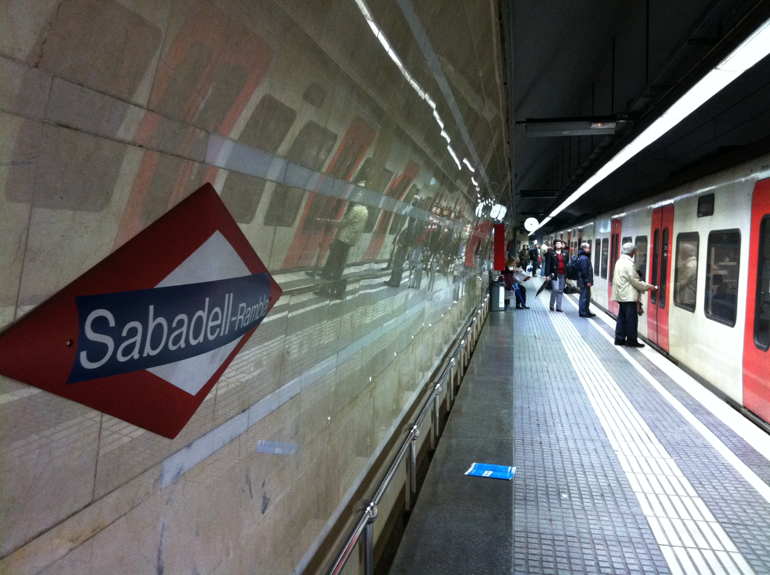 Estació de Sabadell Rambla dels FGC